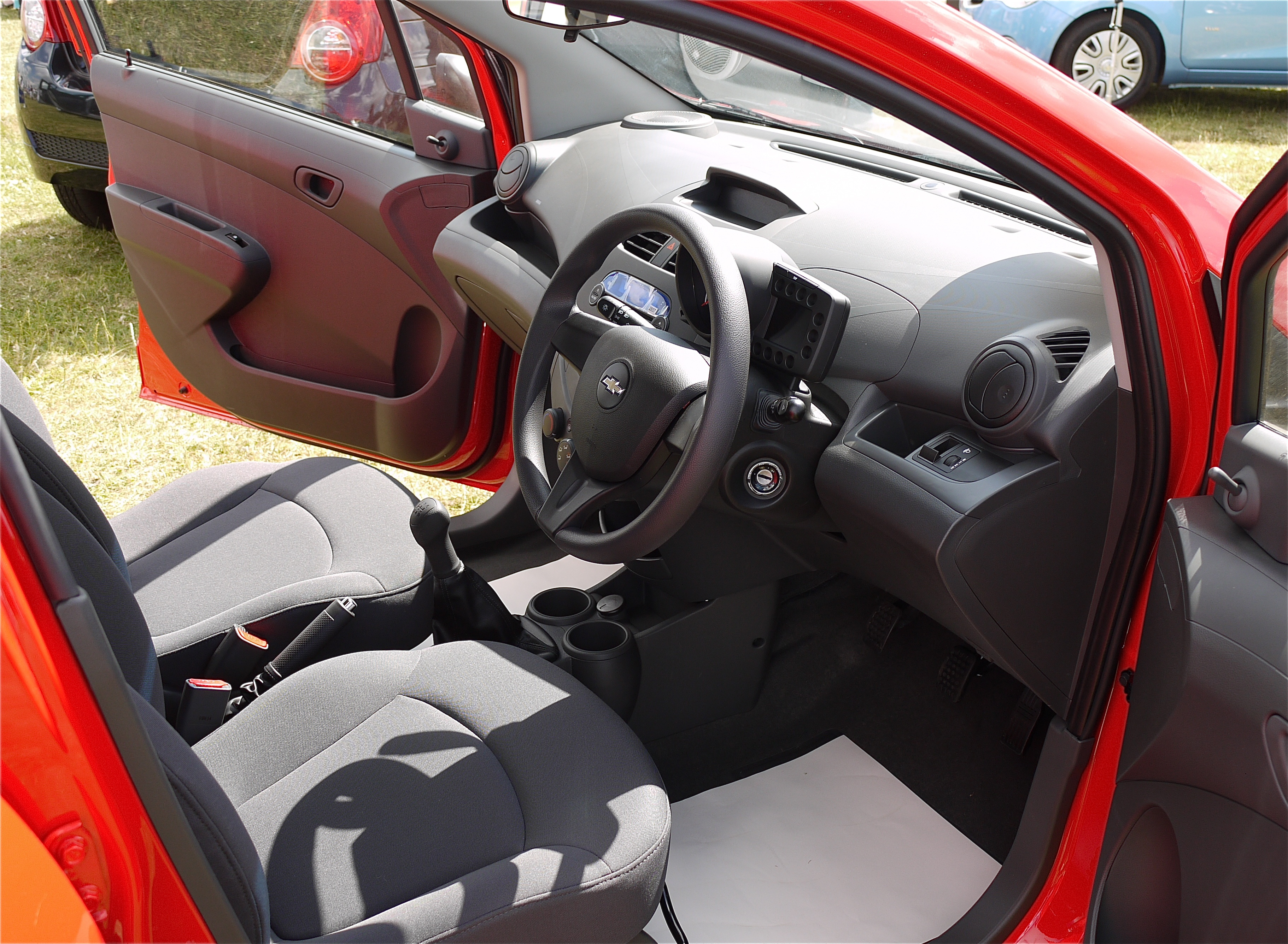 Panasonic G1 14-45 Lens